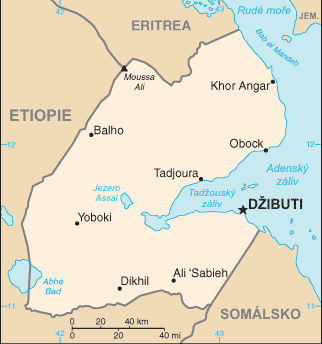 Mapa Džibutska.